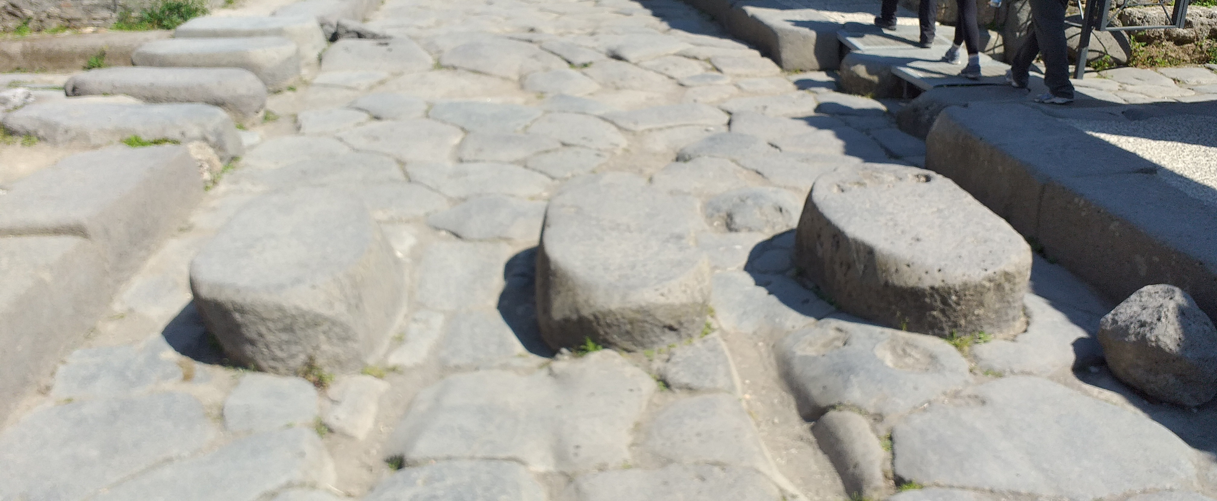 A pedestrian crossing in Pompei streets.